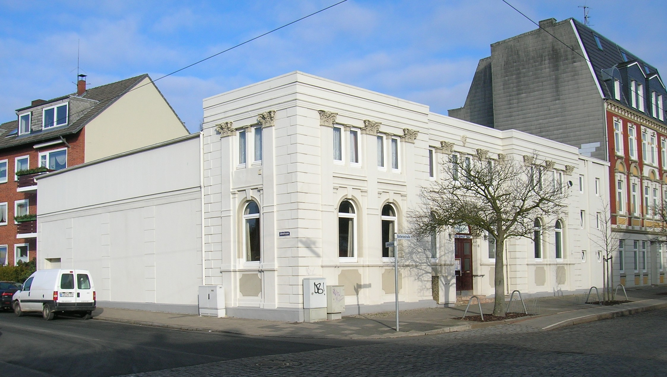 Ehemalige Turnhalle des Turnvereins Lehe in der Batteriestraße, Bremerhaven-Lehe